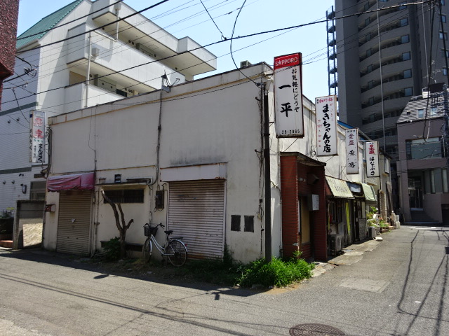 唯一の昔からと思われる飲み屋が左に1軒、右に4軒、右の焼き鳥屋さん ビール500円とバーの2軒のみ夜営業中、造りはカウンターに5席で同じ造り。2階は旧置屋？